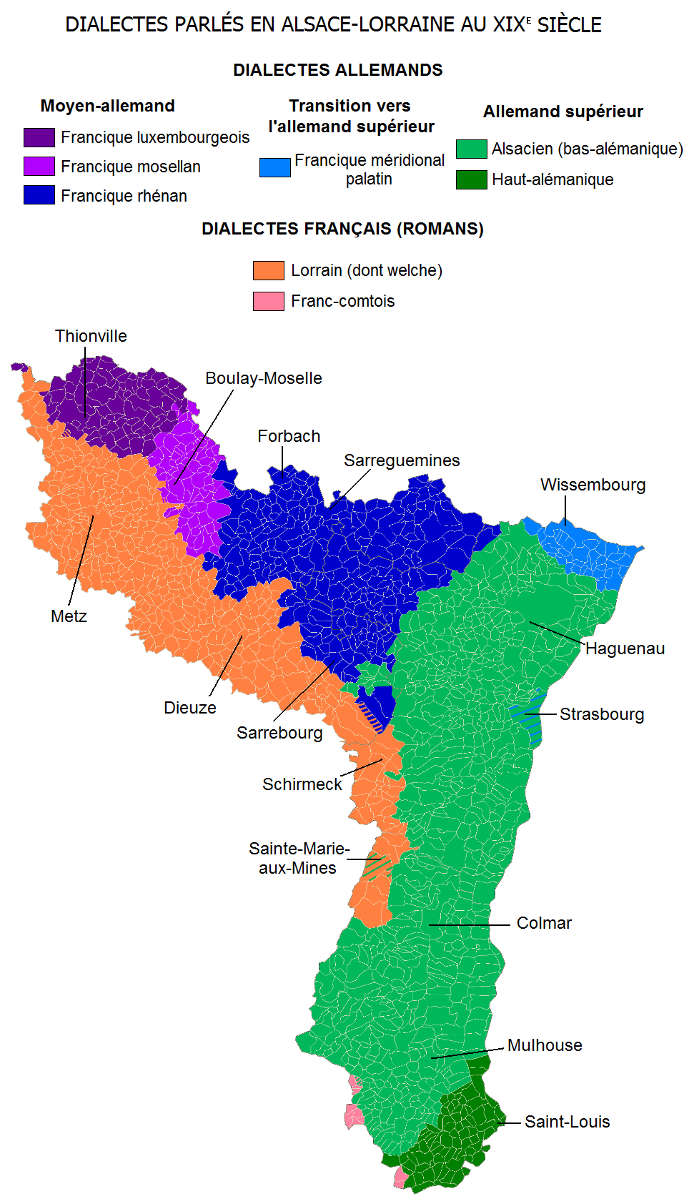 Carte créée à partir des cartes historiques linguistiques à et de la carte de la frontière des dialectes romans et germaniques en Moselle de Constantin This de 1886 (voir page 7).